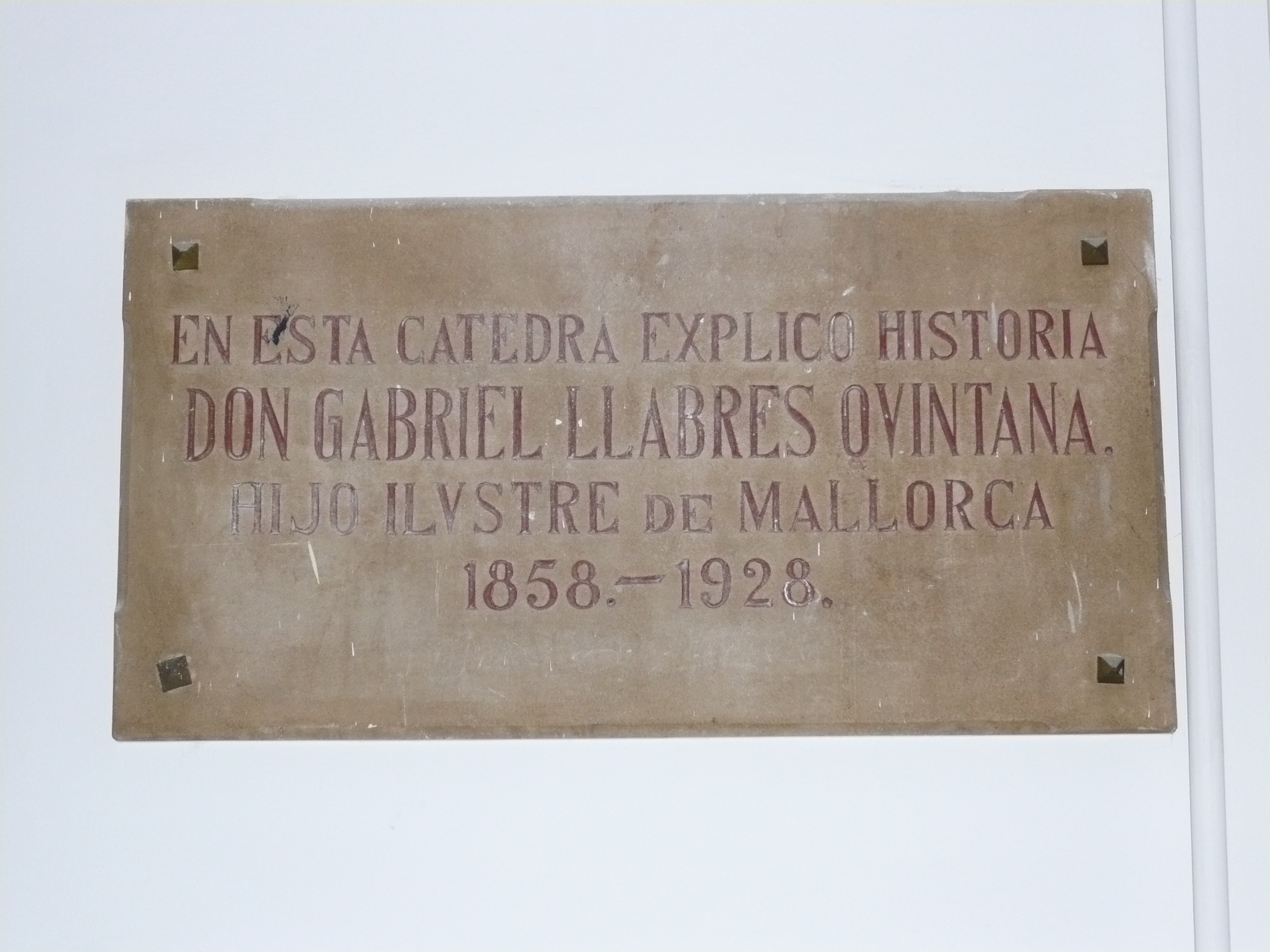 Detall placa commemorativa de fill il·lustre de l'IES Ramon Llull